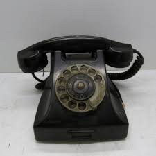 telefone antigo